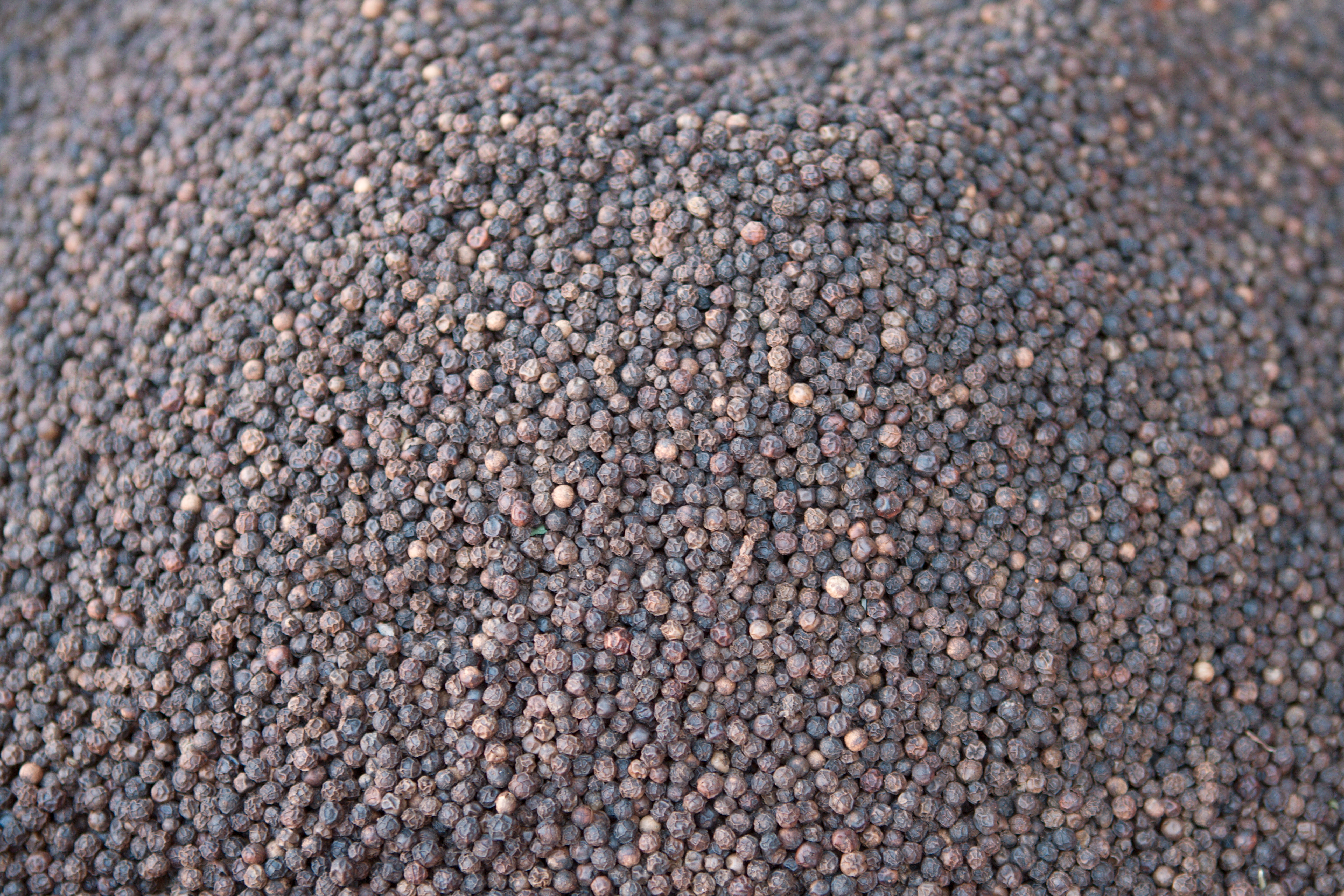 Poivre noir sur le marché d'Aix-en-Provence (France).